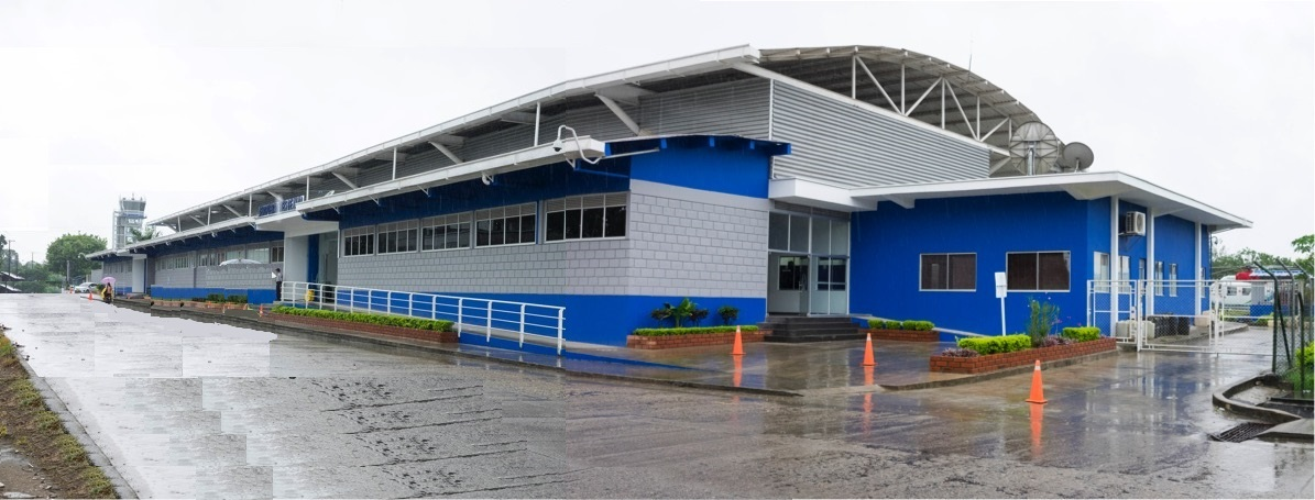 Actualmente el aeropuerto cuenta con vuelos domésticos que sirven a la localidad de Puerto Asís y el departamento del putumayo, hacia Bogotá, Cali y Puerto Leguizamo, además se encuentra ubicado dentro del casco urbano del municipio, por el incremento urbanístico y comercial del mismo.